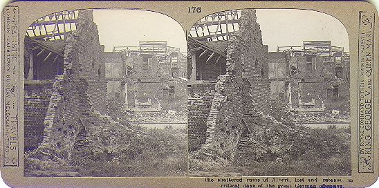 Brit tartalékos katonák harcban Albert közelében